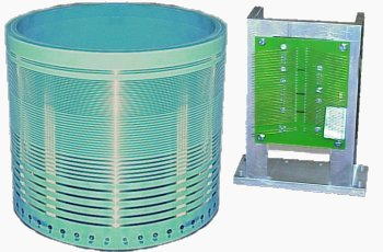 Teile einer Slipring-Unit des Wetterradars Meteor 1500 von Gematronik